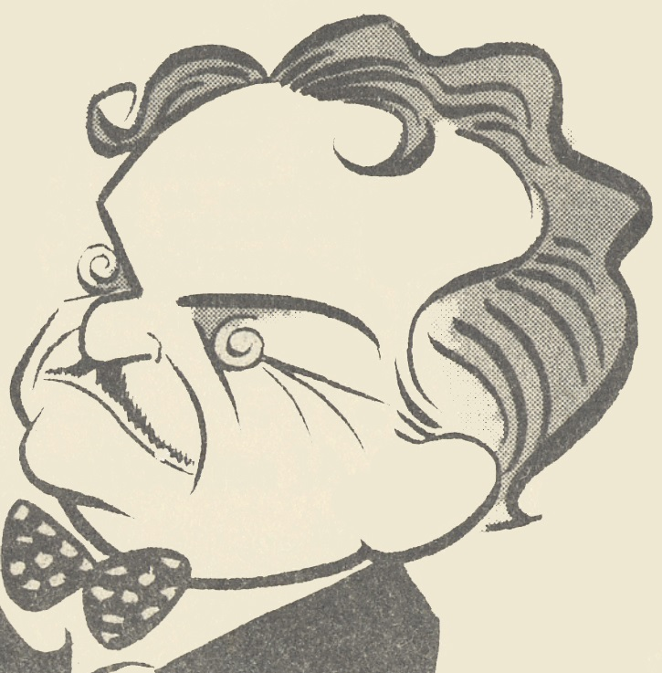 Caricatura de Jorge Délano (COKE) hecha por René Ríos Boettiger "Pepo" en "Los actuales dibujantes de Zig Zag" (1955). En Medio siglo de Zig-Zag : 1905-1955. Santiago : Zig-Zag, 1955. 462 páginas